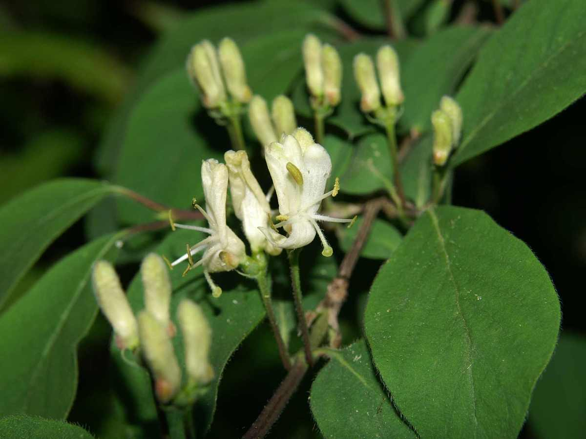 Puhastolistno kosteničevje na Šmarni gori.